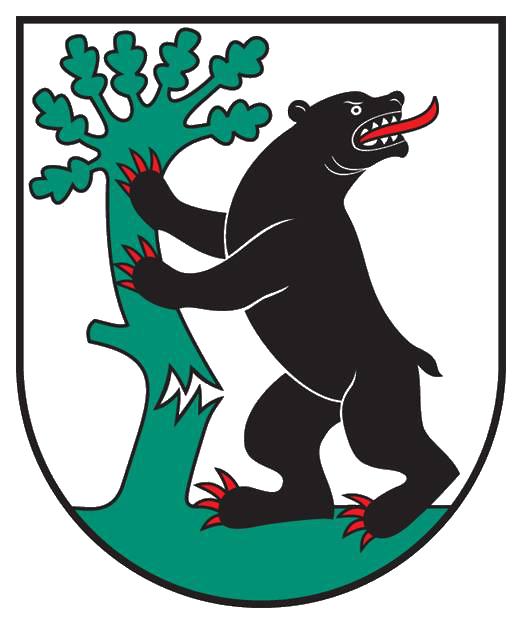 Išlaužo herbas